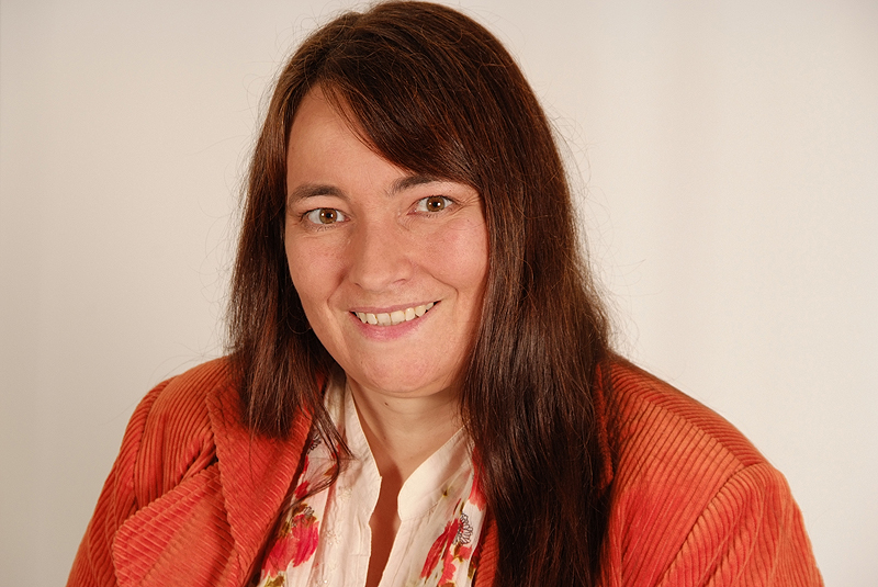 Kreszentia Flauger, Landtagsabgeordnete Niedersachsen, 16. Wahlperiode (Fotoprojekt Landtagsabgeordnete Niedersachsen am 24. und 25. November 2009)